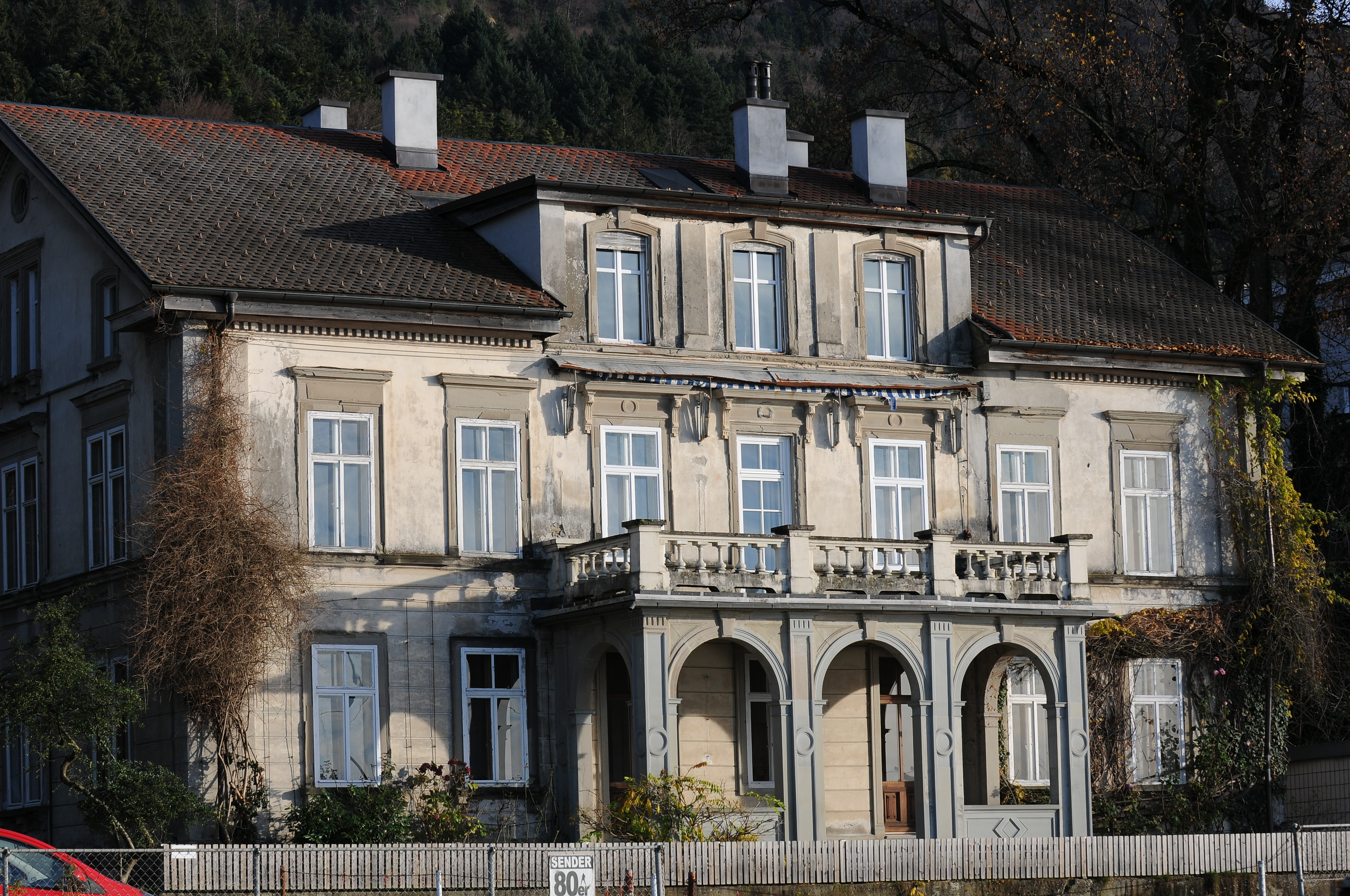 Villa Mauthe 1875/76 von Fürstin Auersperg errichtet und 1896 vom Uhrenfabrikant Friedrich Mauthe erworben; Bregenzer Straße Nr. 43 in Lochau (Vorarlberg).